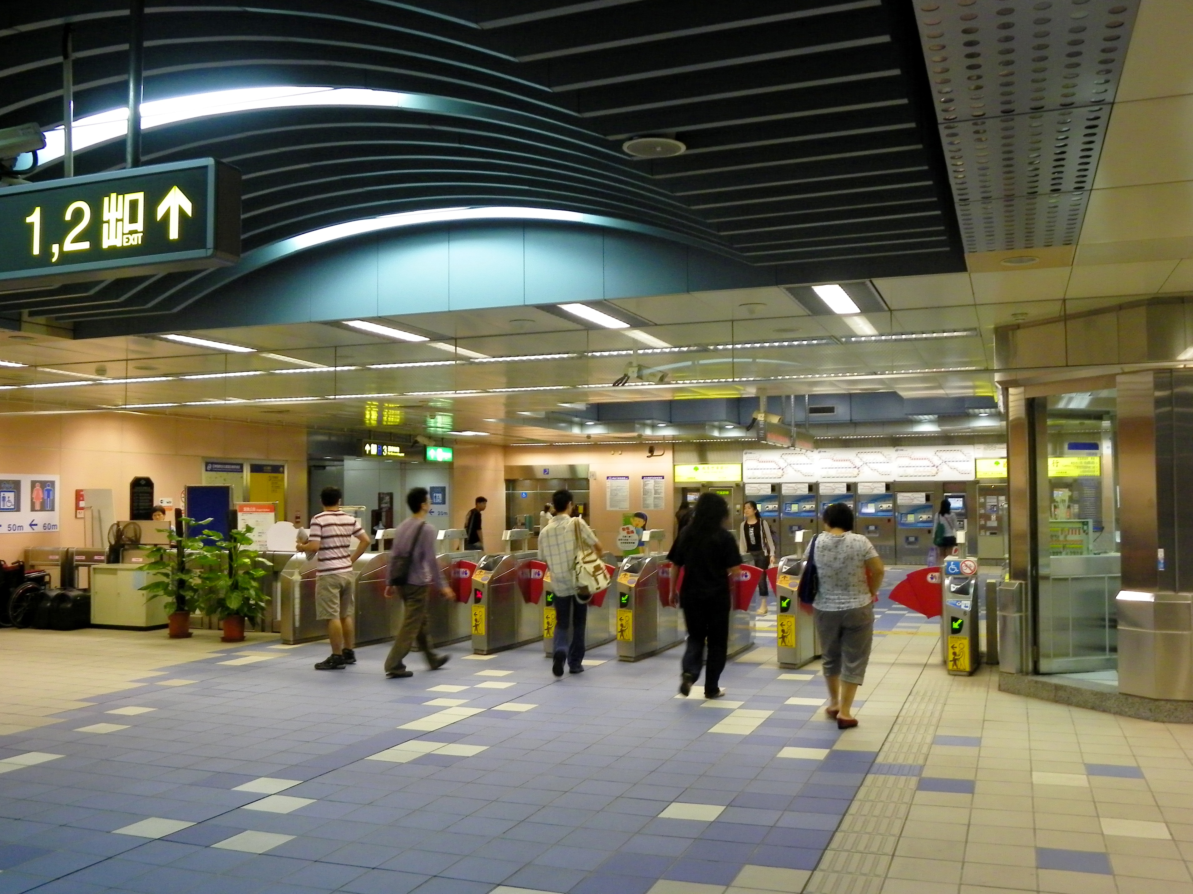 台北捷運土城線亜東病院駅の改札口。